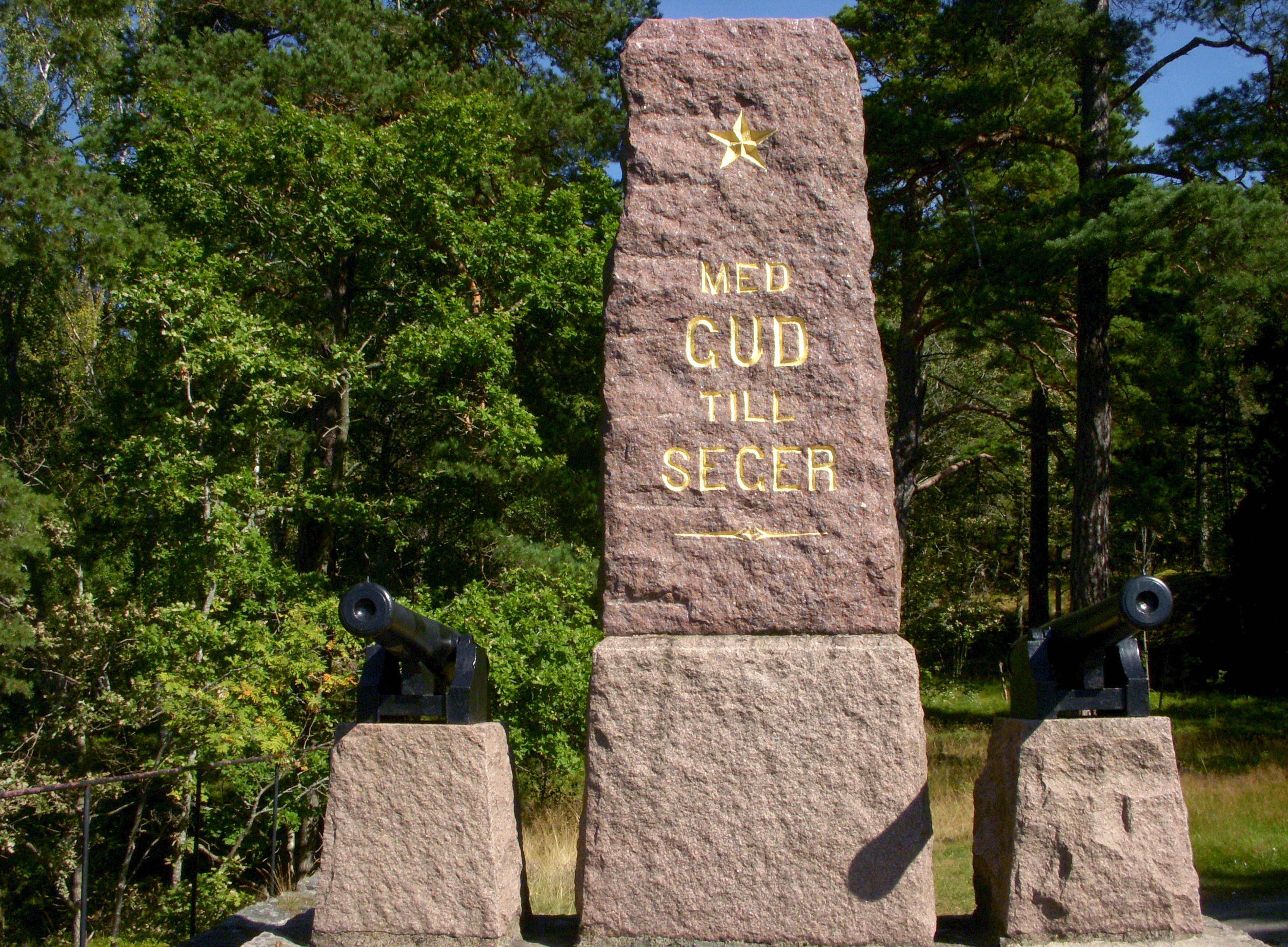 Skogsömonumentet